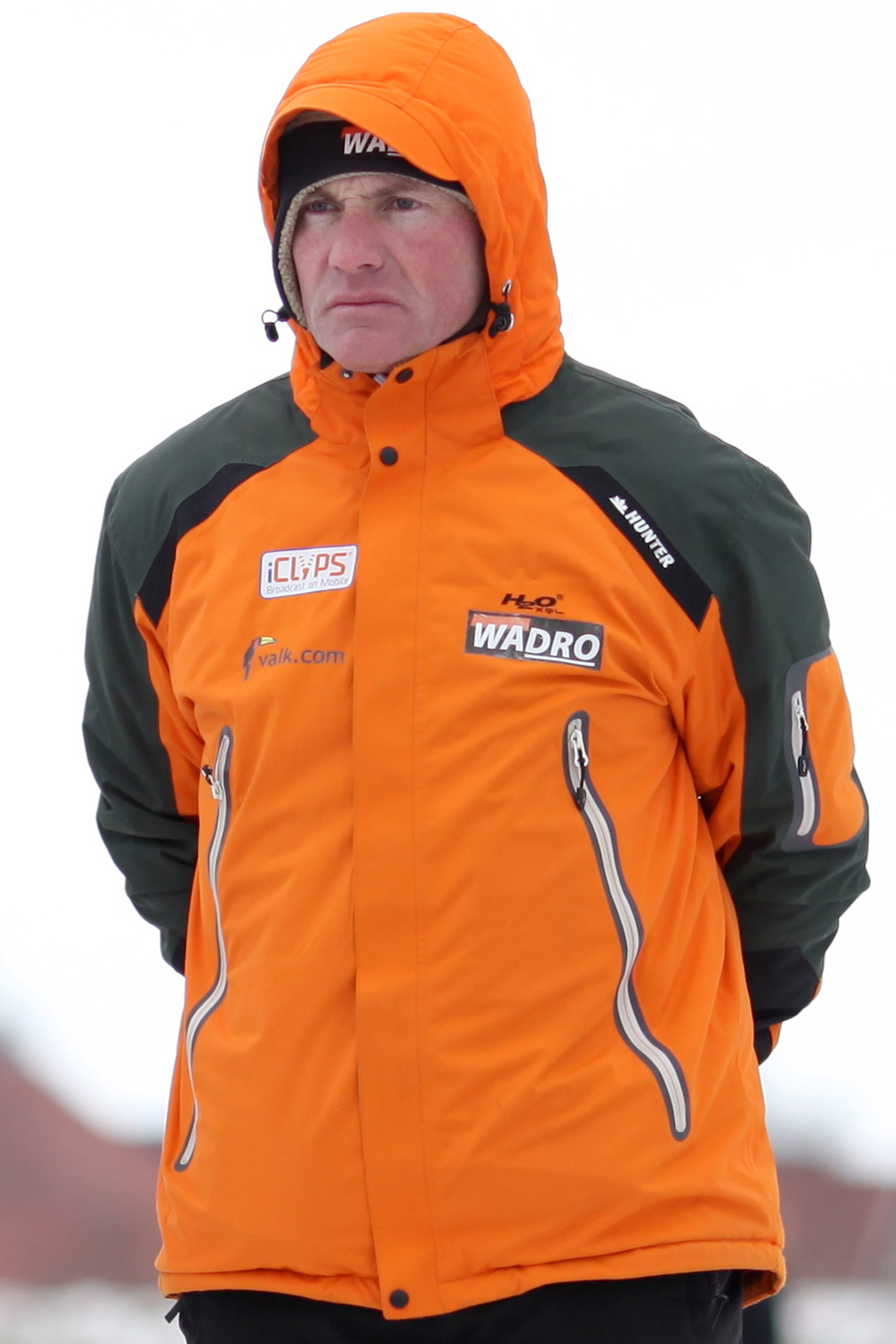 Henk Angenent (Woubrugge, 1 november 1967) is een voormalig Nederlands marathonschaatser en spruitjeskweker uit Woubrugge. In 1997 won hij de Elfstedentocht.